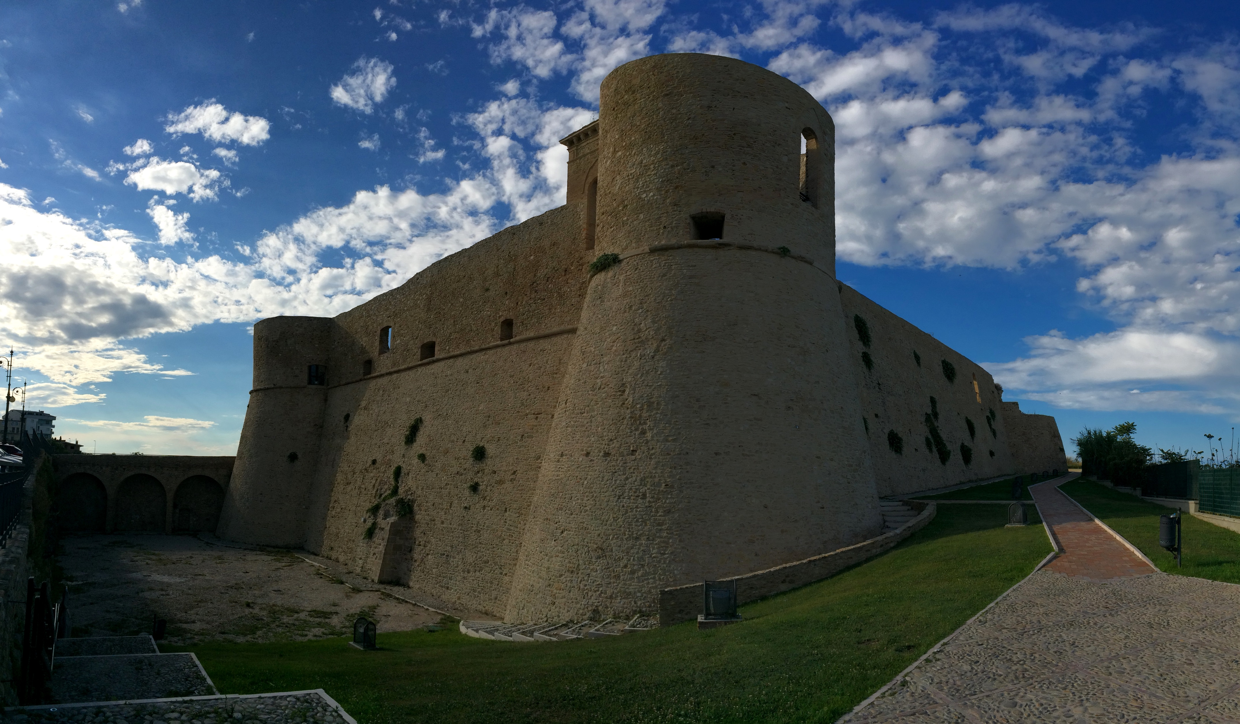 Veduta del Castello Aragonese di Ortona, Chieti.